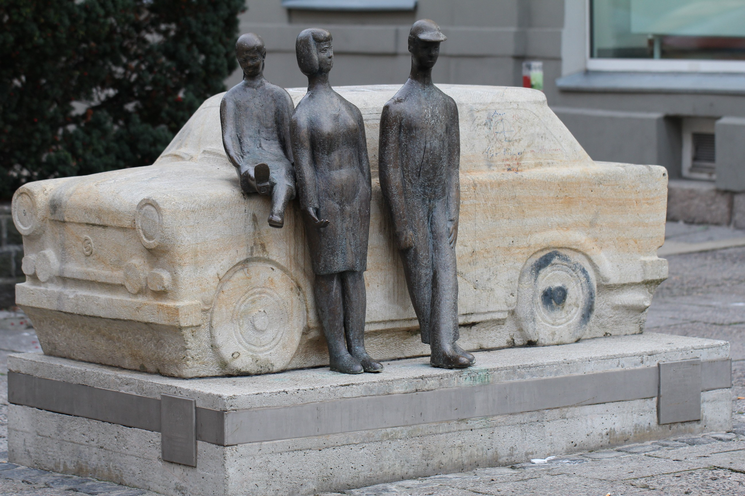 Zwickau, die Geburtsstadt des Trabant hat seit 1998 dieses Denkmal des "Trabi" am Georgenplatz (steht seit 2015 am neuen Standort am August-Horch-Museum).